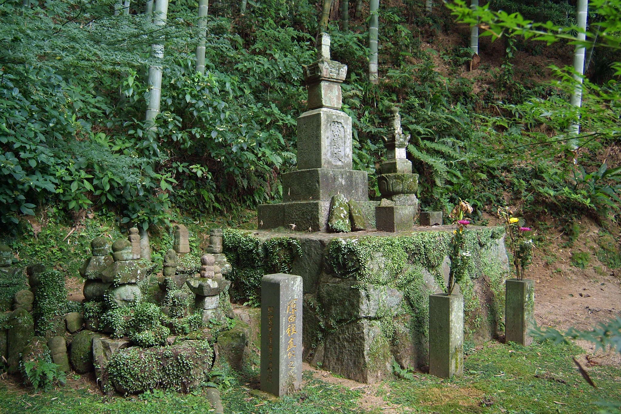 Tomb of Harada Tanenao